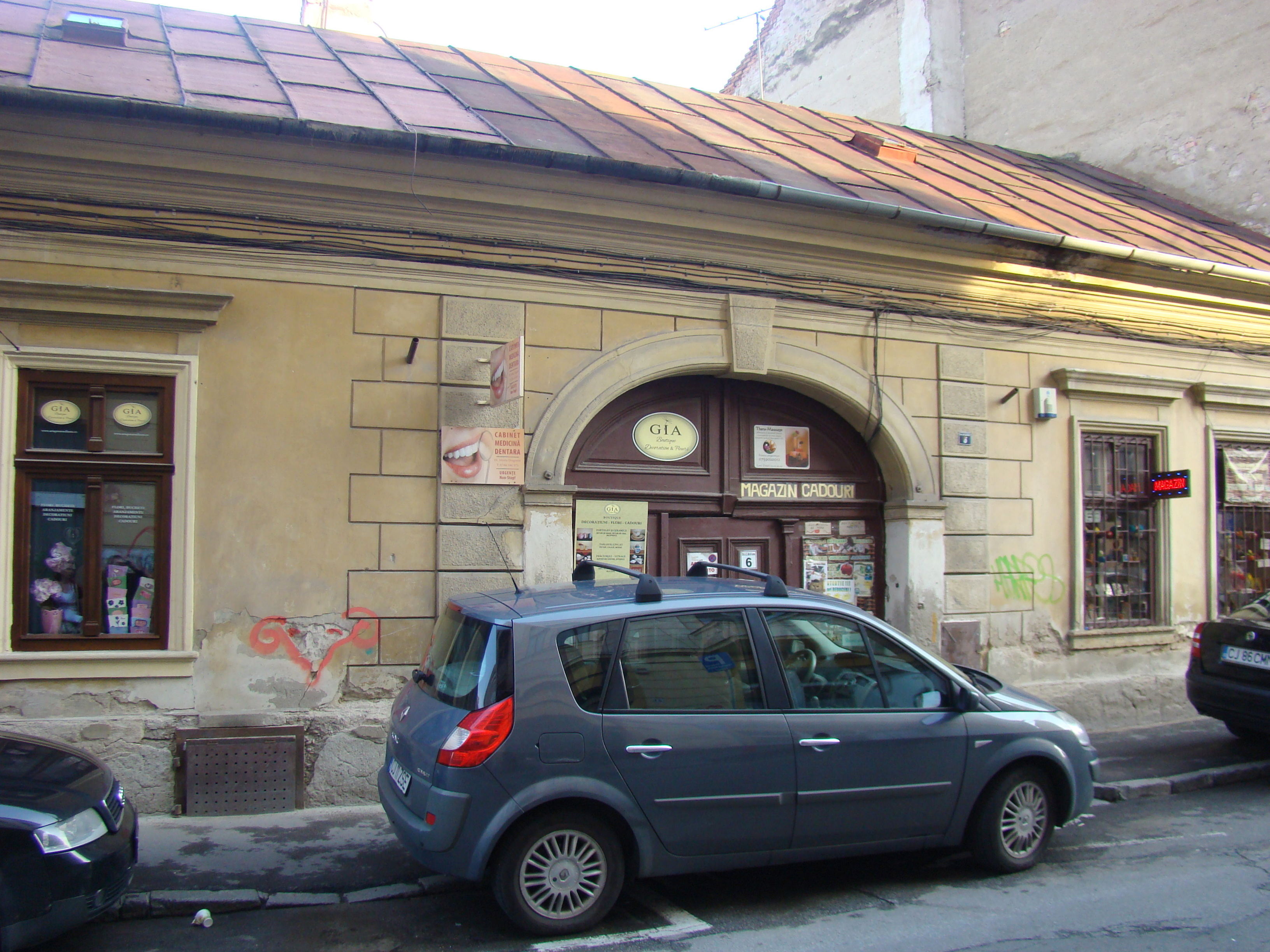 Casă monument strada I.C.Brătianu nr.6